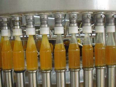 Abfüllanlage naturtrüber Apfelsaft